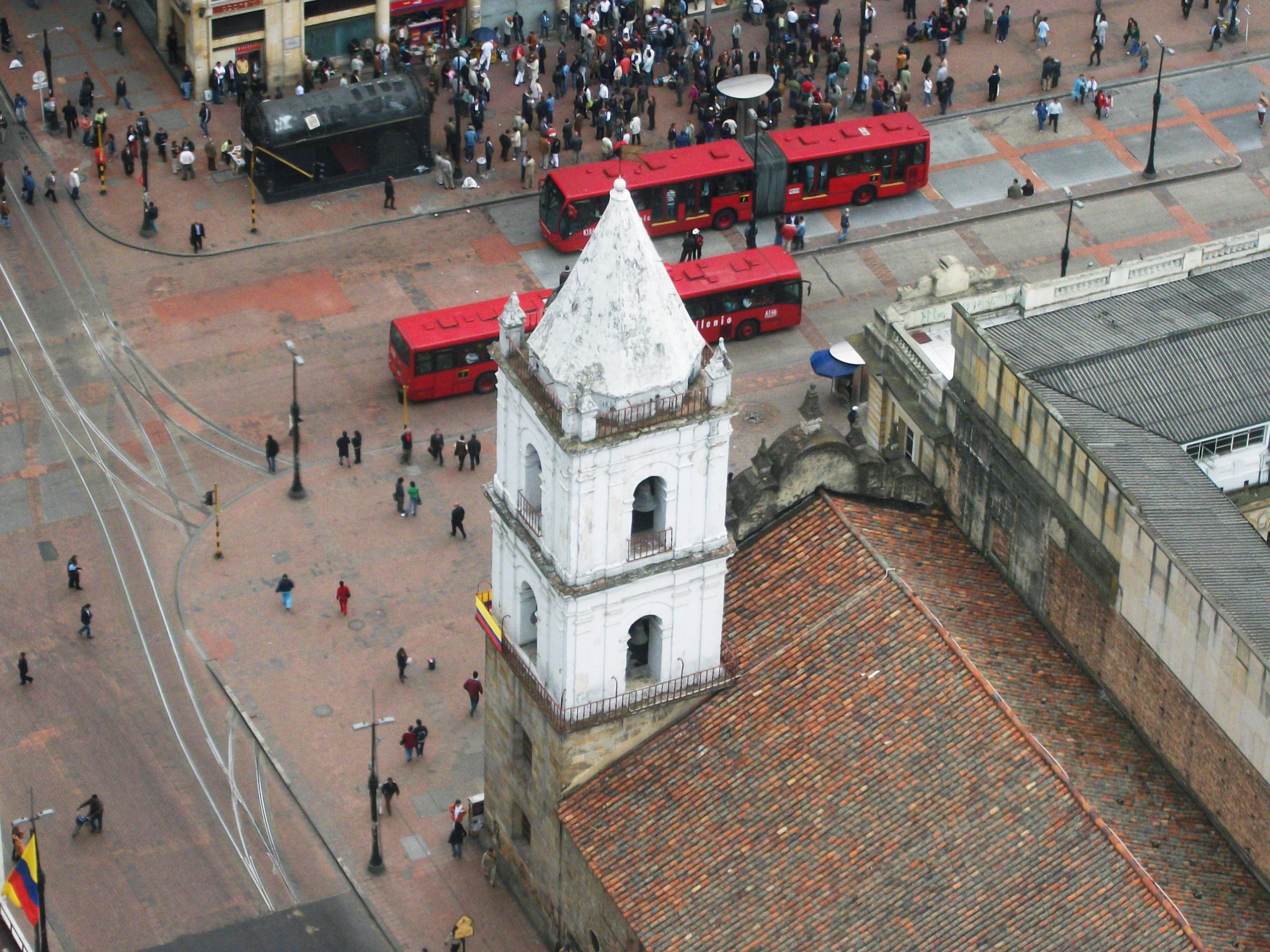 Iglesia de San Francisco en la av Jiménez. Bogotá.